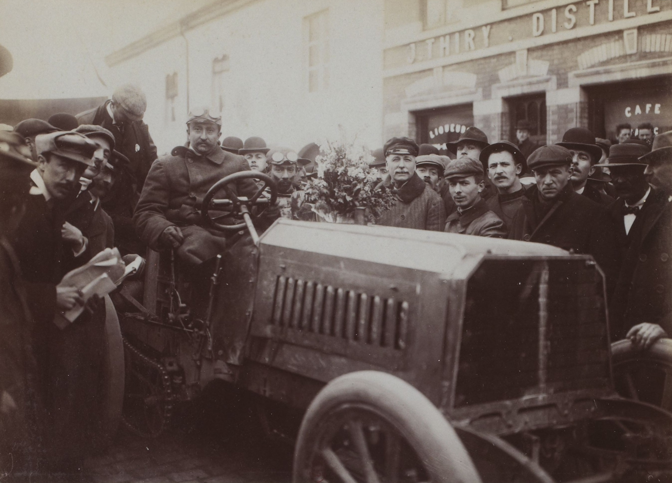 [Collection Jules Beau. Photographie sportive] : T. 22. Année 1903 / Jules Beau : F. 4v. Circuit des Ardennes, Bastogne, 22 - 23 juin 1903